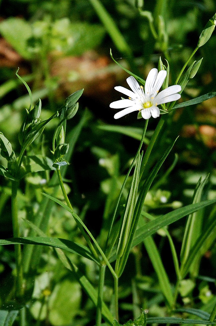 Grasmuur (Stellaria graminea